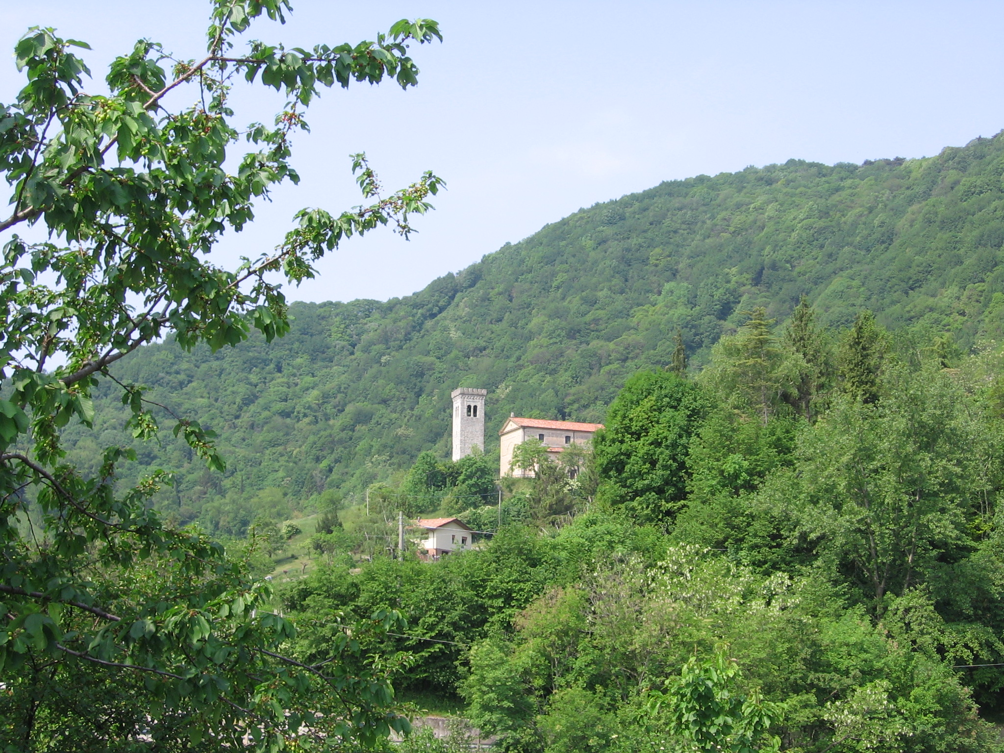 San Lorenzo (Vittorio Veneto, Italy)'s church